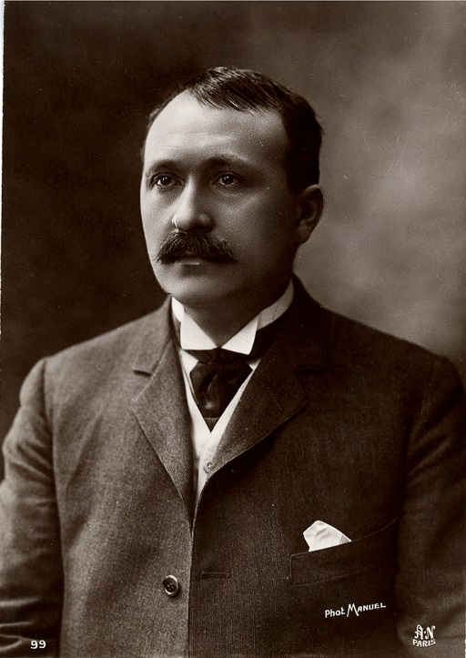 René Viviani - photo Henri Manuel